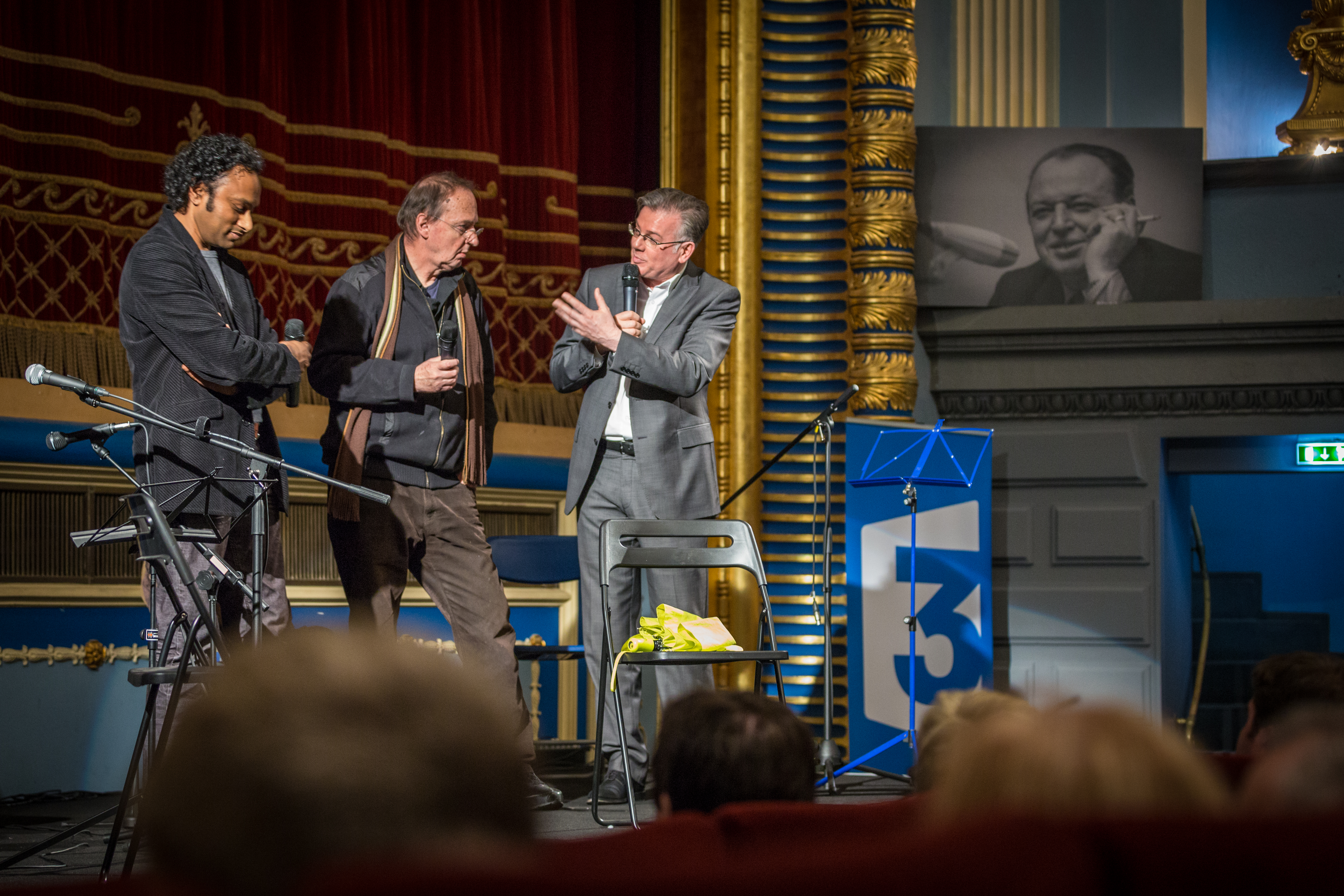 Strasbourg cinéma Odyssée hommage à Germain Mulller 22 février 2014.